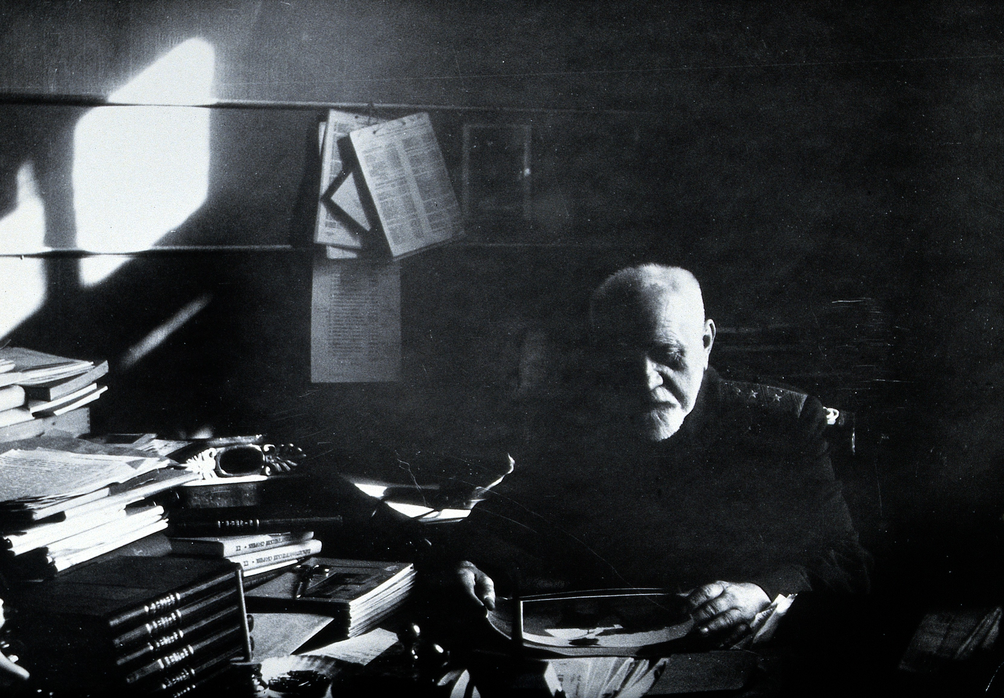 Evgenil Nikanorovich Pavlovsky (Yevgeny Pavlovsky. Photograph by L.J. Bruce-Chwatt.